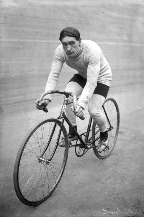 Charles Crupelandt, né le 23 octobre 1886 et mort le 18 février 1955 à Roubaix, est un cycliste français, surnommé "le Taureau du Nord" pour son gabarit et surtout ses sprints. Il est connu pour être le seul Roubaisien à avoir remporté Paris-Roubaix, et ce à deux reprises